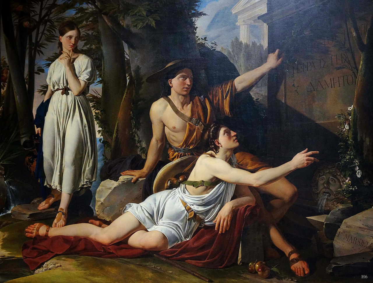 Bergers d'Arcadie lisant une inscription grecque (1830), huile sur toile de Filippo Marsigli.